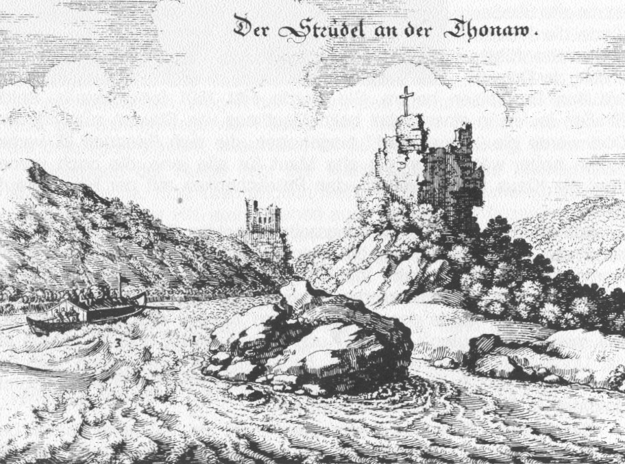 Titel: Der Strudel an der Thonaw